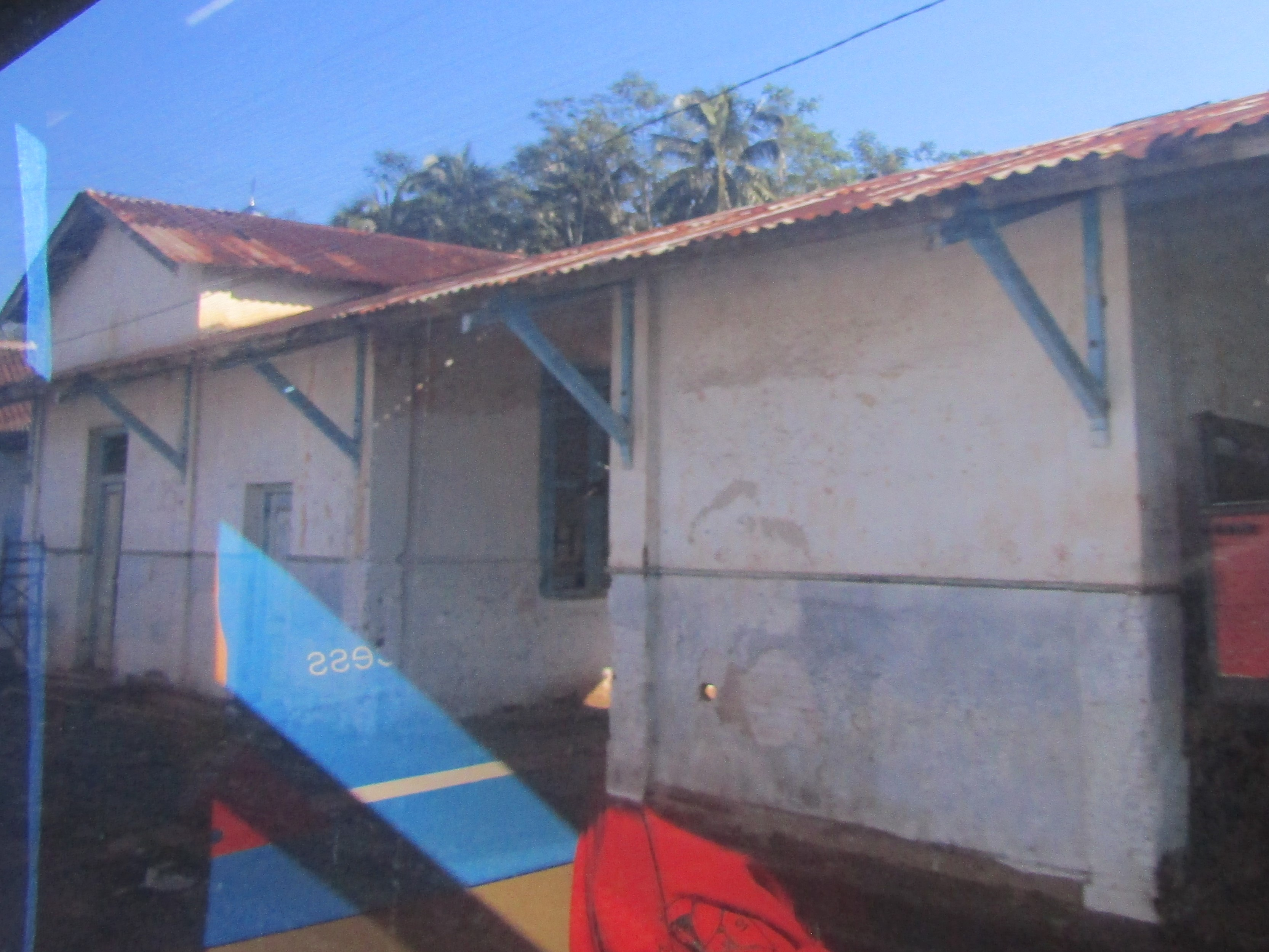 Bekas stasiun Kempit di Banyuwangi, Jawa Timur